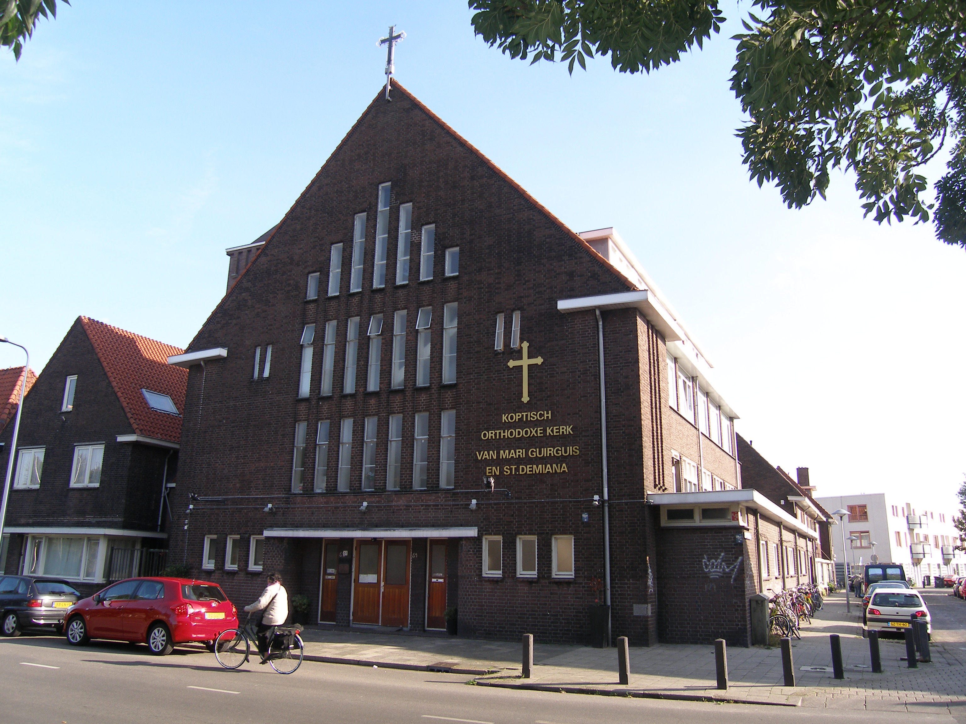 Koptische Kerk in de Adriaan van Bergenstraat Utrecht